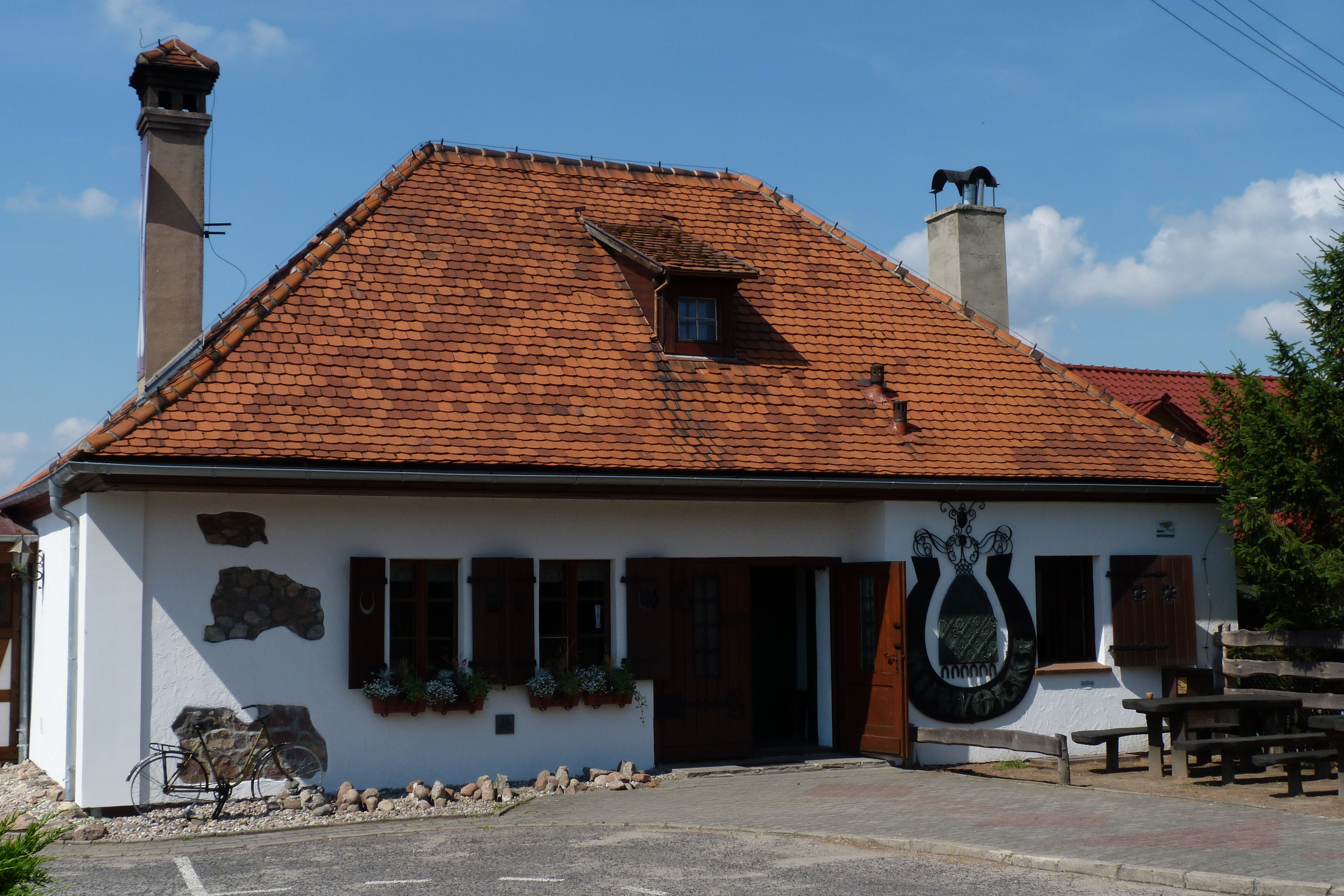 Cukiernia Kowolka w Kłodzie, wybudowana z elementami kuźni z 1785 r.